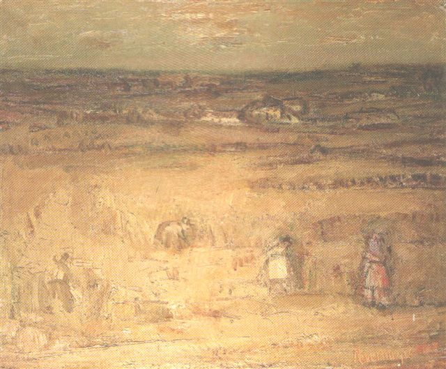 Moisson